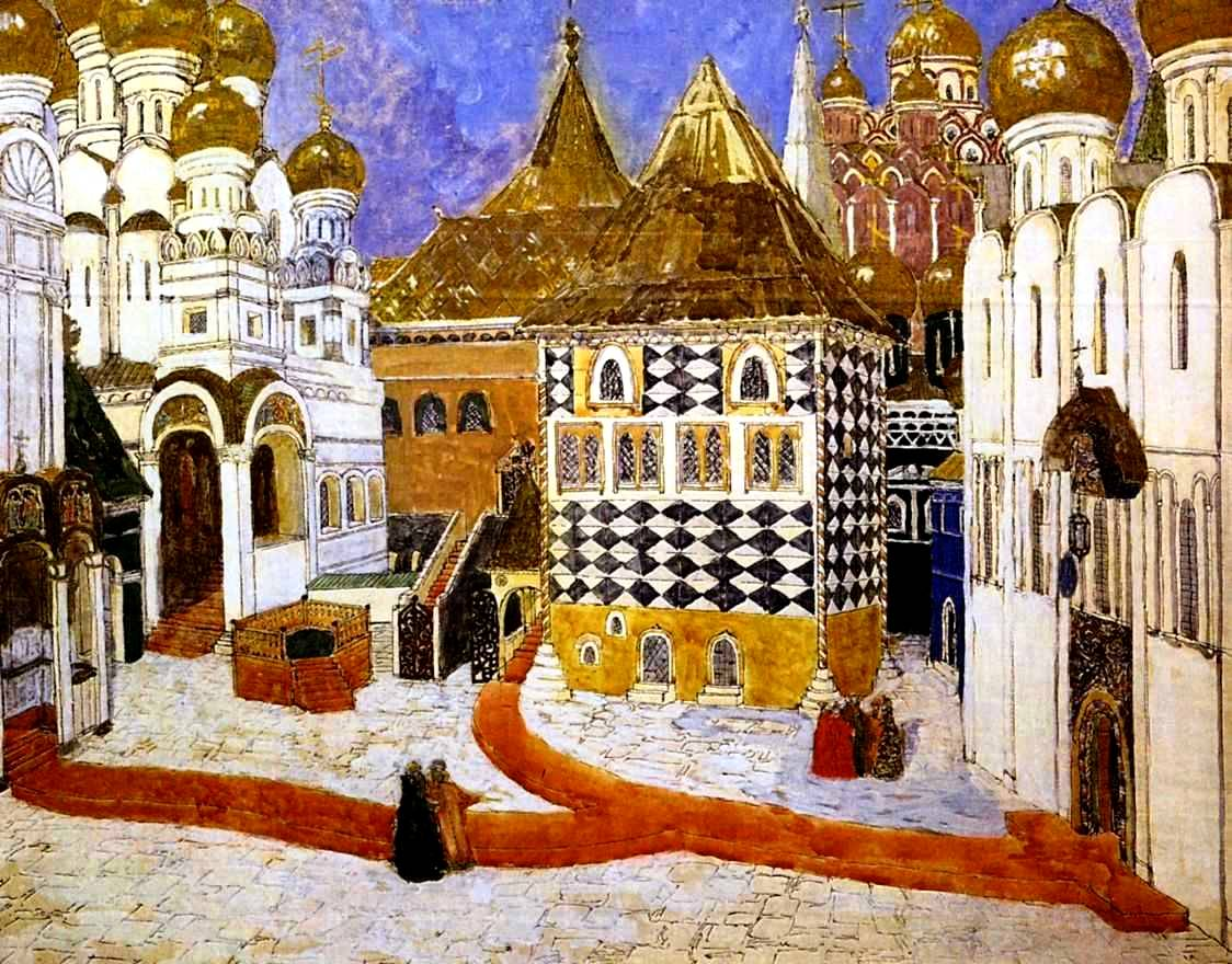 Эскиз декорации к опере Борис Годунов